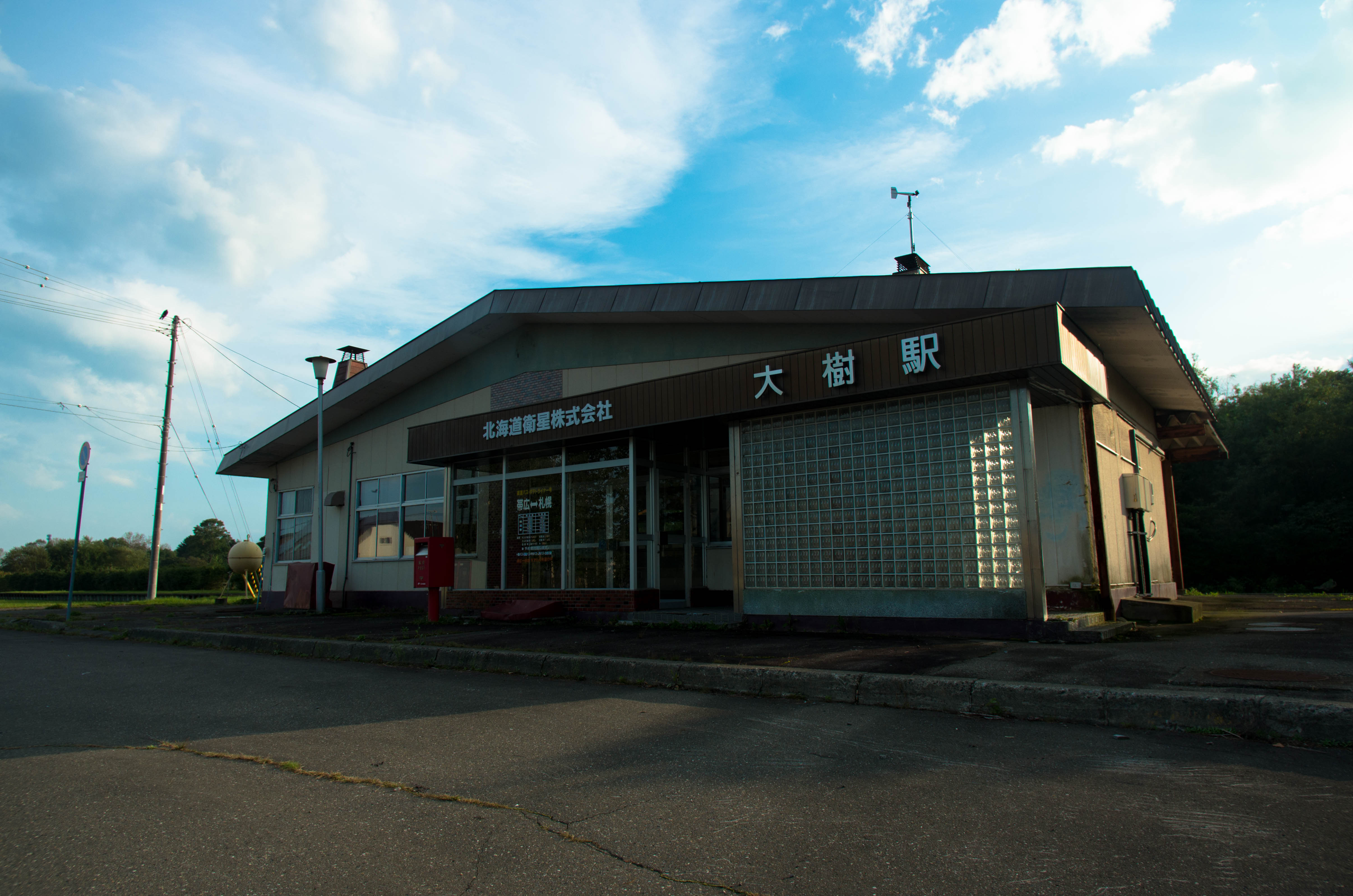 日本国有鉄道広尾線大樹駅駅舎